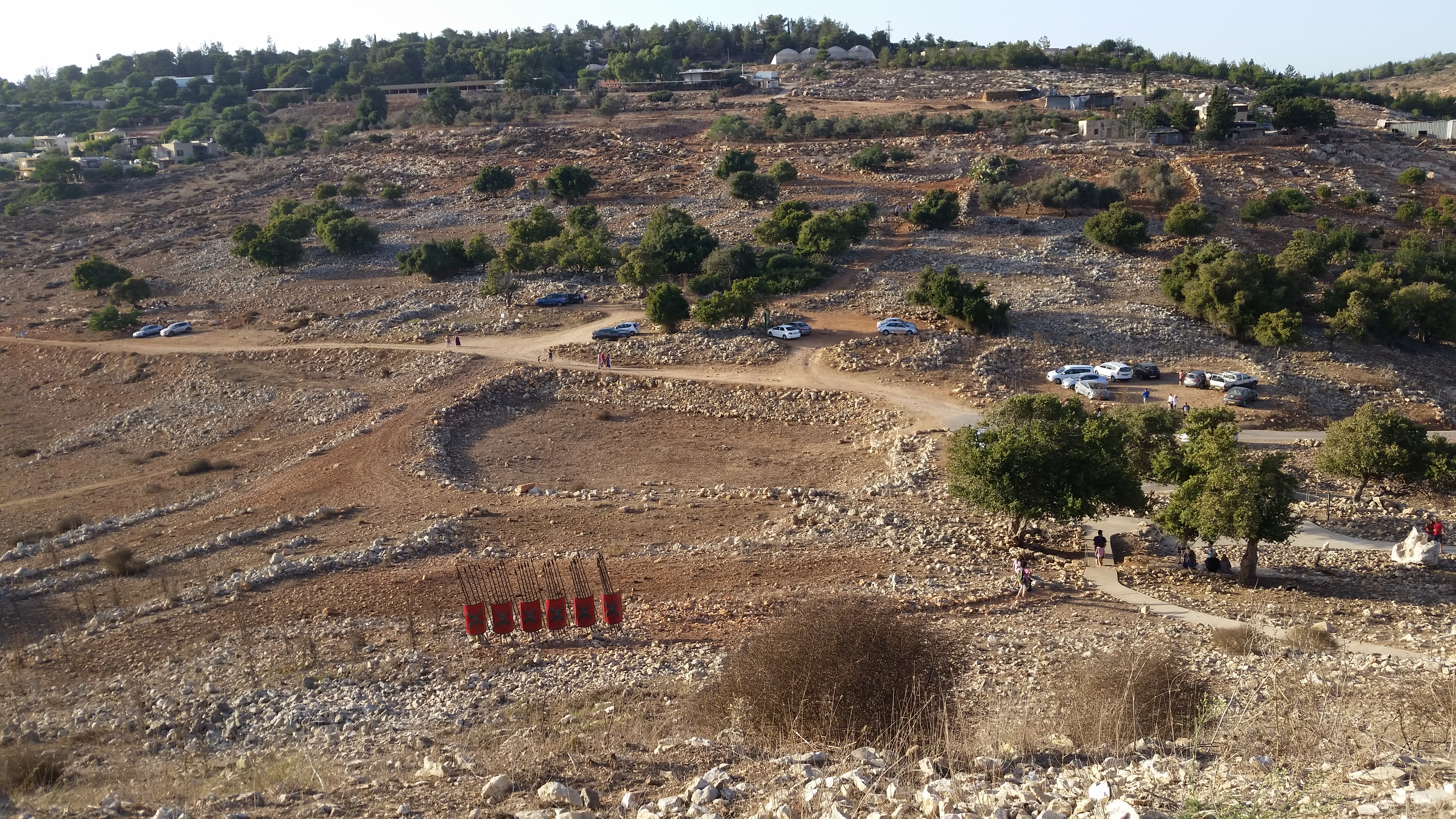 מבט מתל יודפת לכיוון צפון. בתחתית התל נמצאו שרידי התיישבות. הגישה האפשרית לתל נעשית מכיוון צפון